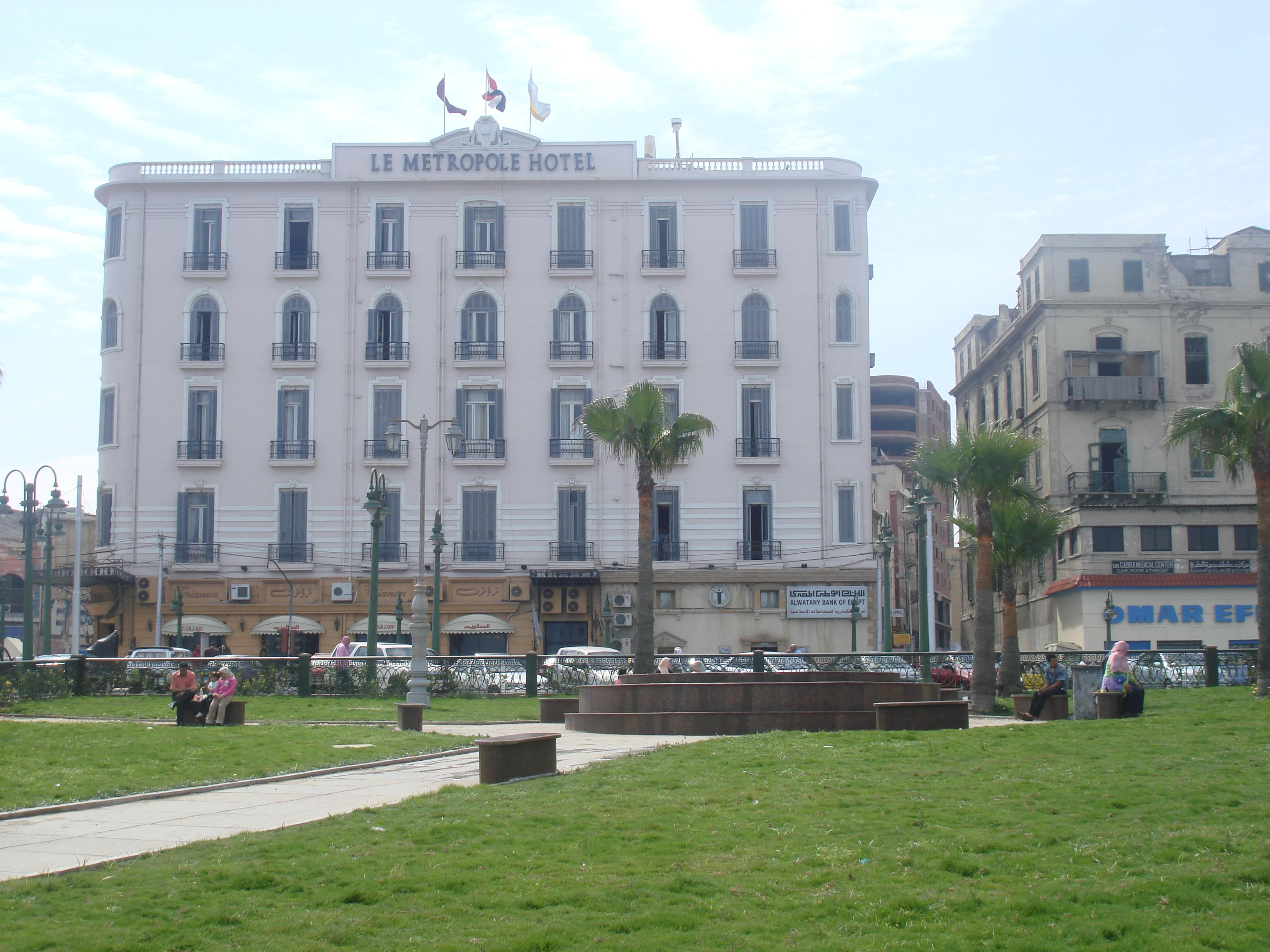 Le Metropole Hotel - Alexandria - Egypt